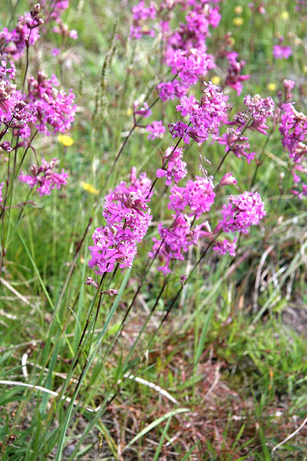 Lychnis viscaria near Ralsko, Czech Republic autor:Prazak